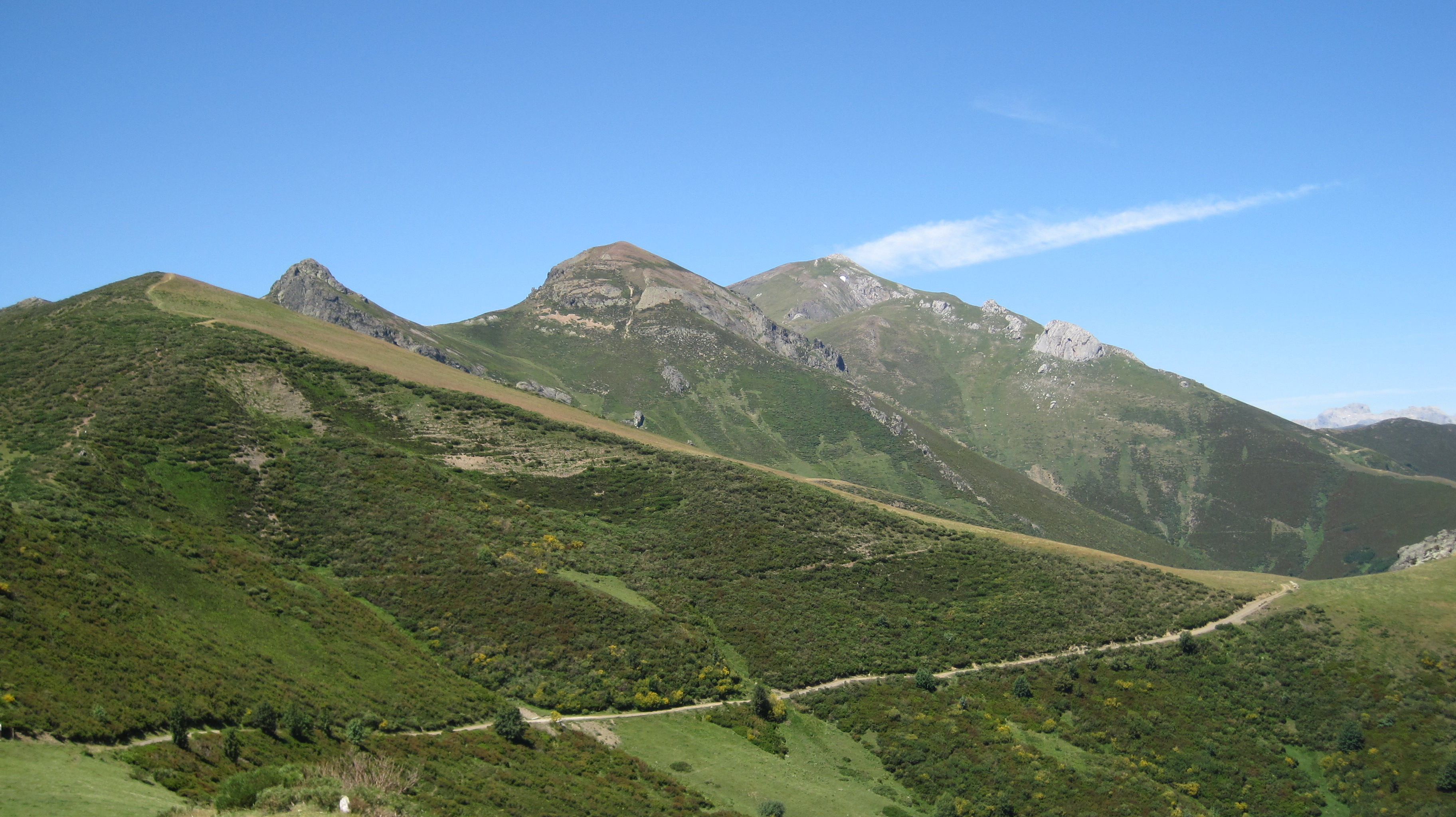 Vista del Coriscao desde el collado de Llesba, en el puerto de San Glorio (León-Cantabria, España).